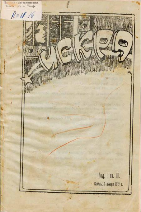 Искра.